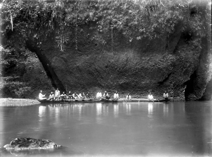 Negatief. Een groep mannen vaart met vlerkprauwen langs de zijwand van een druipsteengrot van Sagea, Halmahera